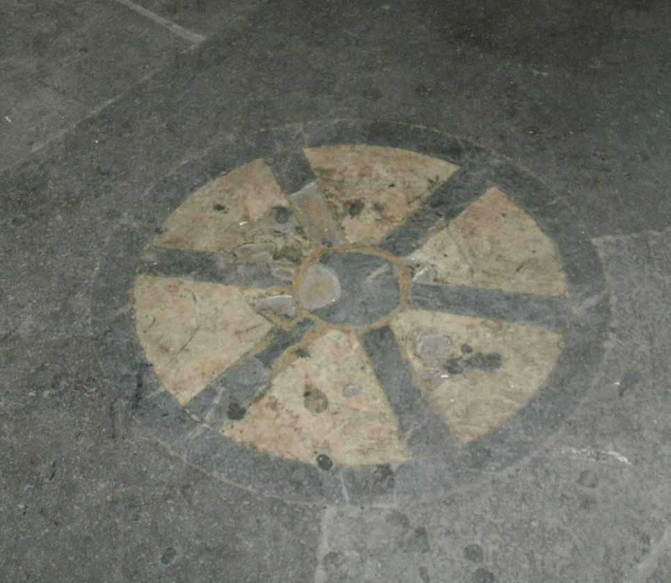 loggia del Porcellino or Loggia del Mercato Nuovo, the scandal stone, from Florence, Italy